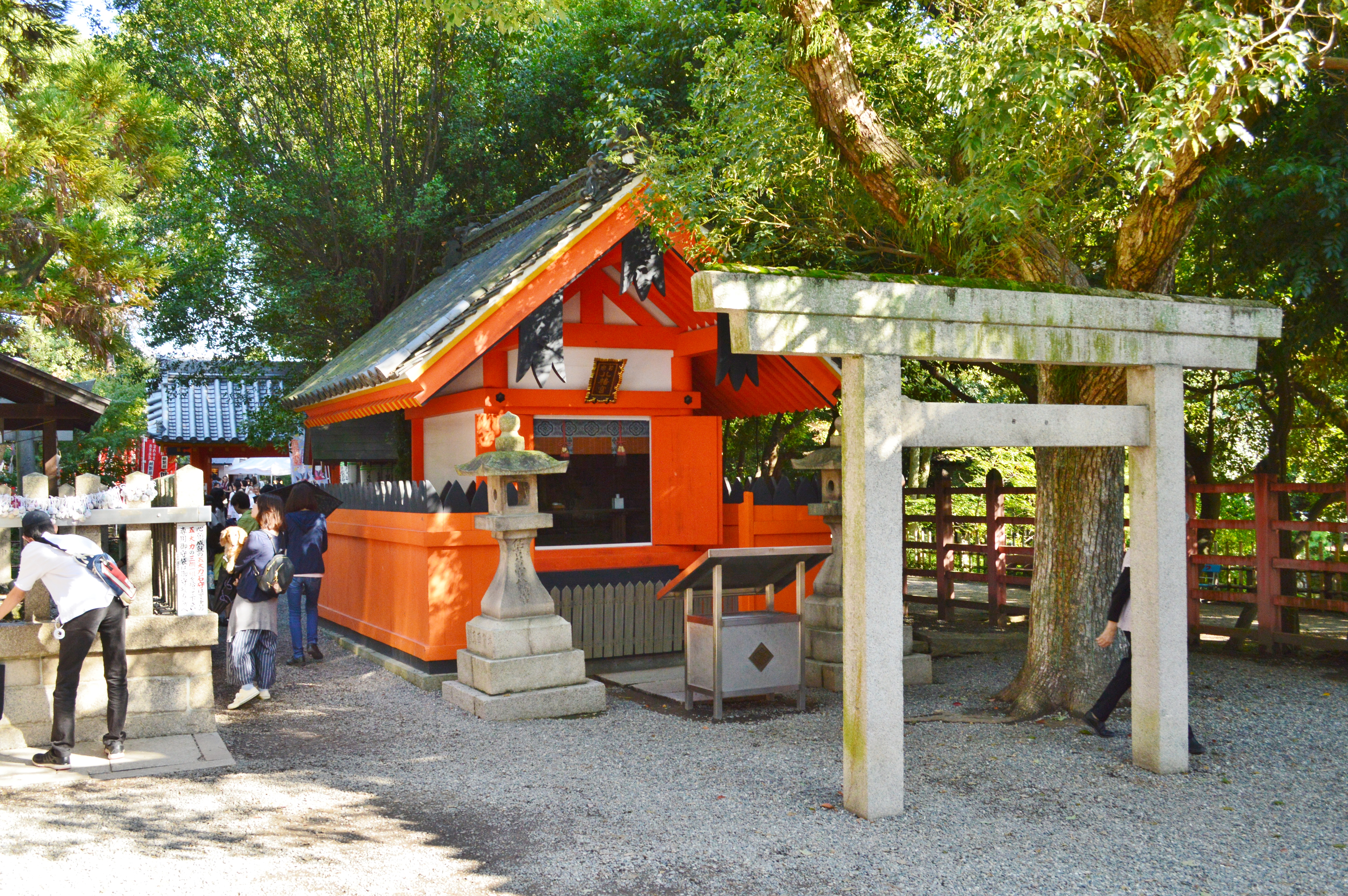 住吉大社境内摂社 若宮八幡宮